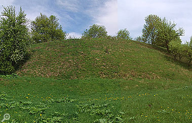 Абарончы вал гарадзішча на Менцы з паўднёвага боку